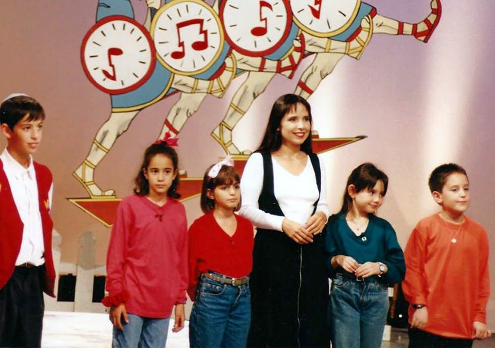 תכנית הטלוויזיה: "מוסיכף" ניצה שאול מנחה ומגישה תכנית אודות מוזיקה קלאסית המיועדת לילדים ולנוער